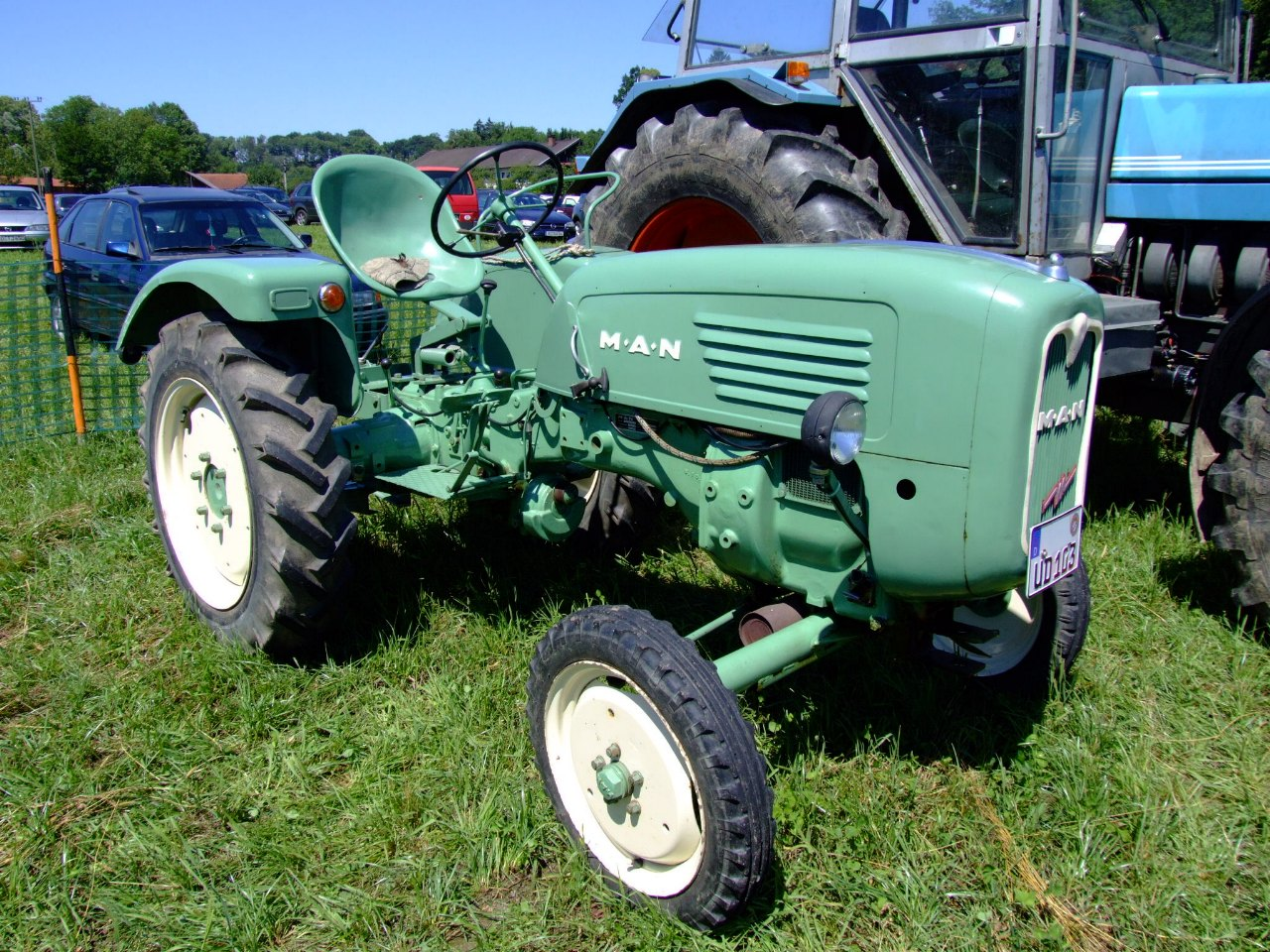 MAN-Schlepper 2F1, Baujahr 1959